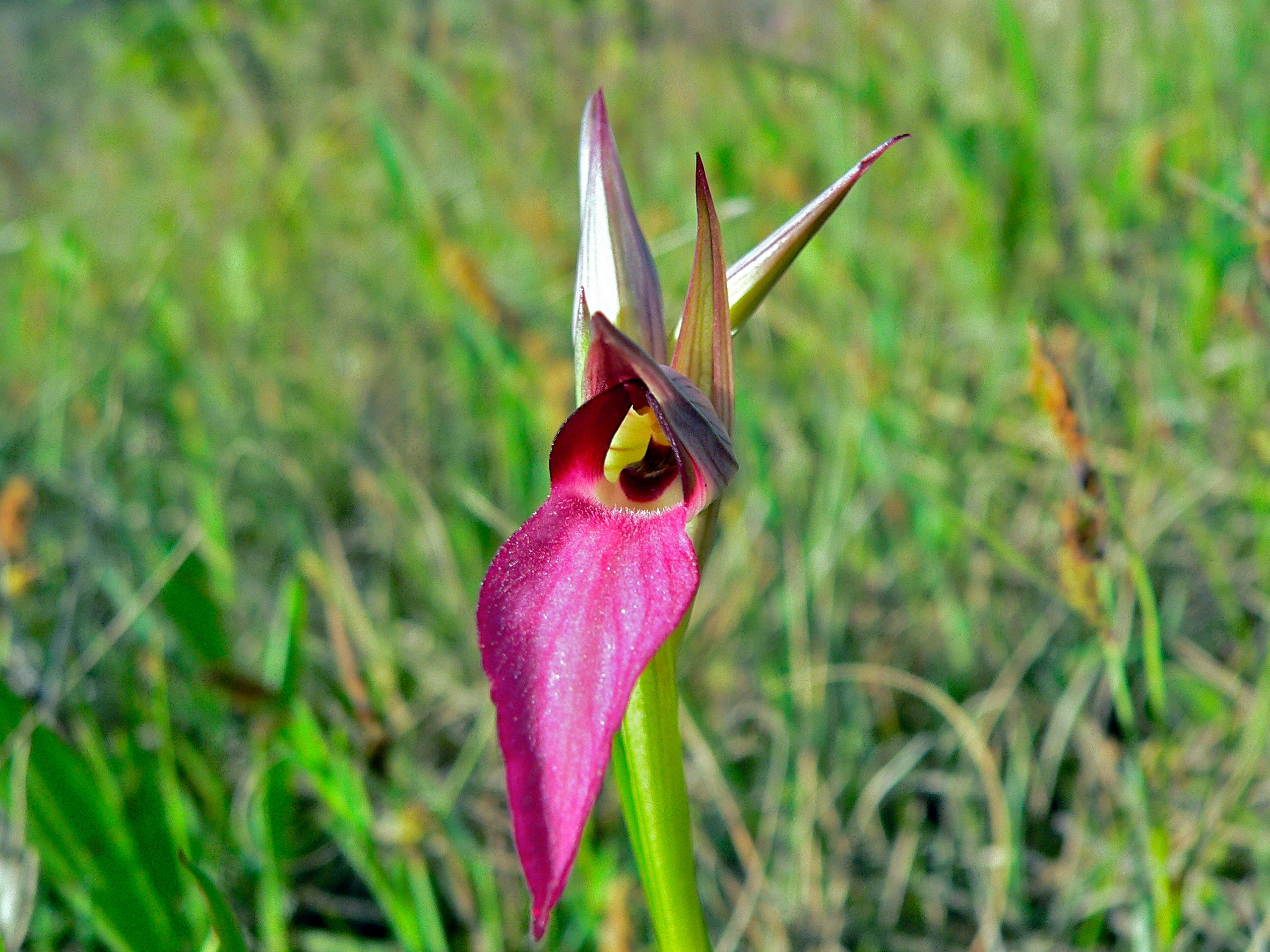 La Lieude, Mérifons, Hérault FRANCE